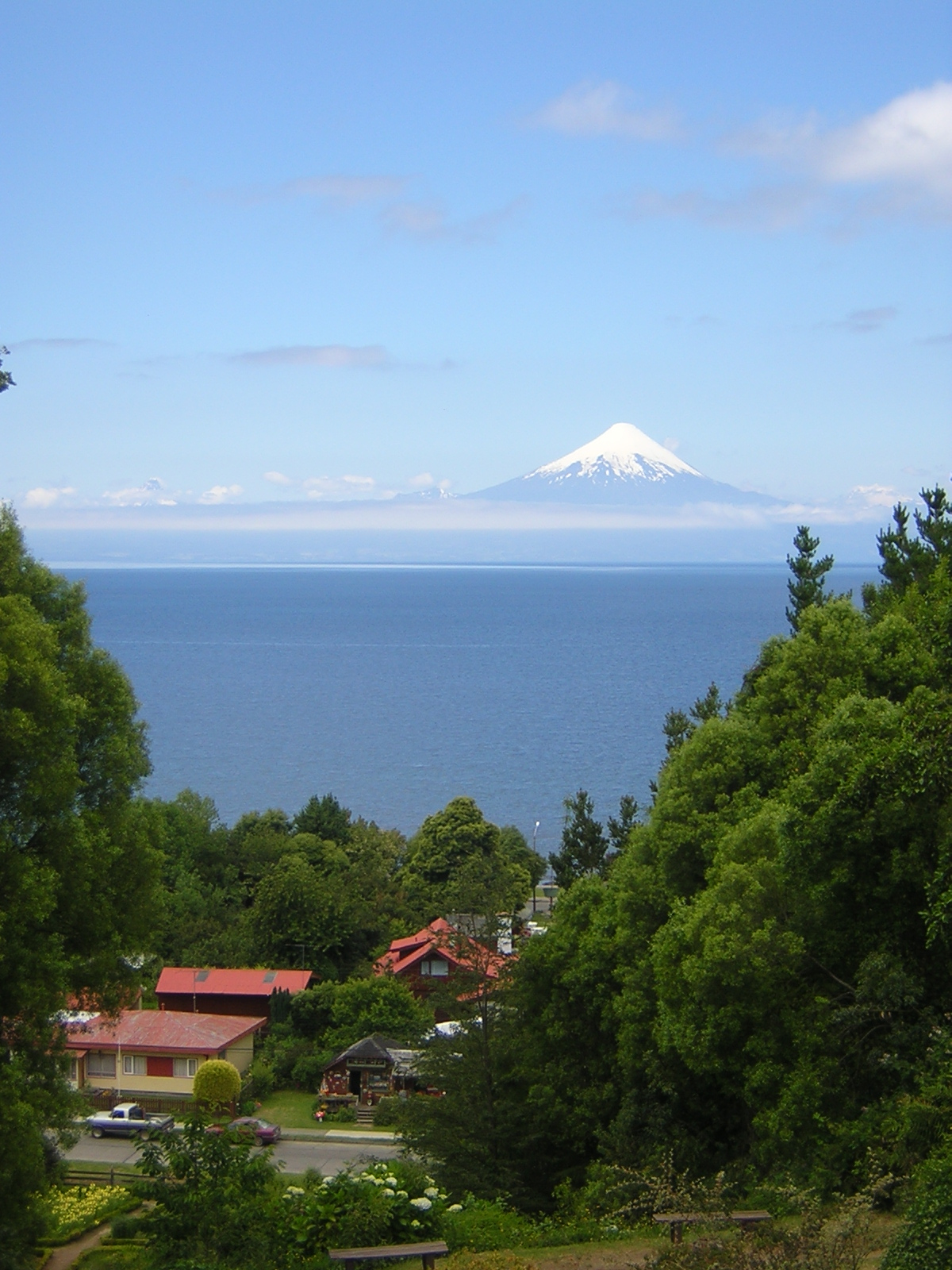 View to Lake Llanquihue and volcano Osorno from Frutillar village. El Nombre del Archivo es Llanquihue